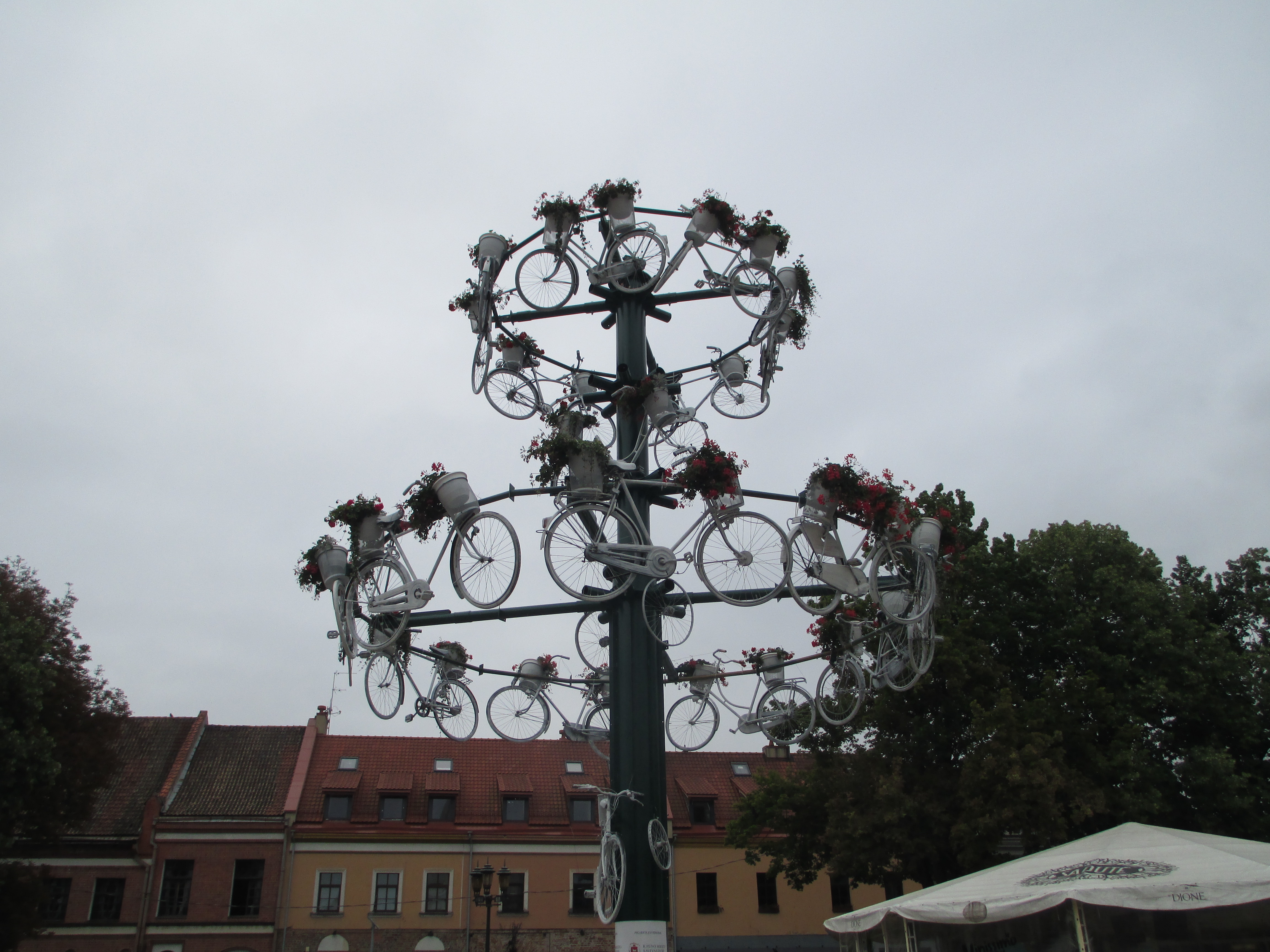 פסל חוצות של אופניים בקובנה